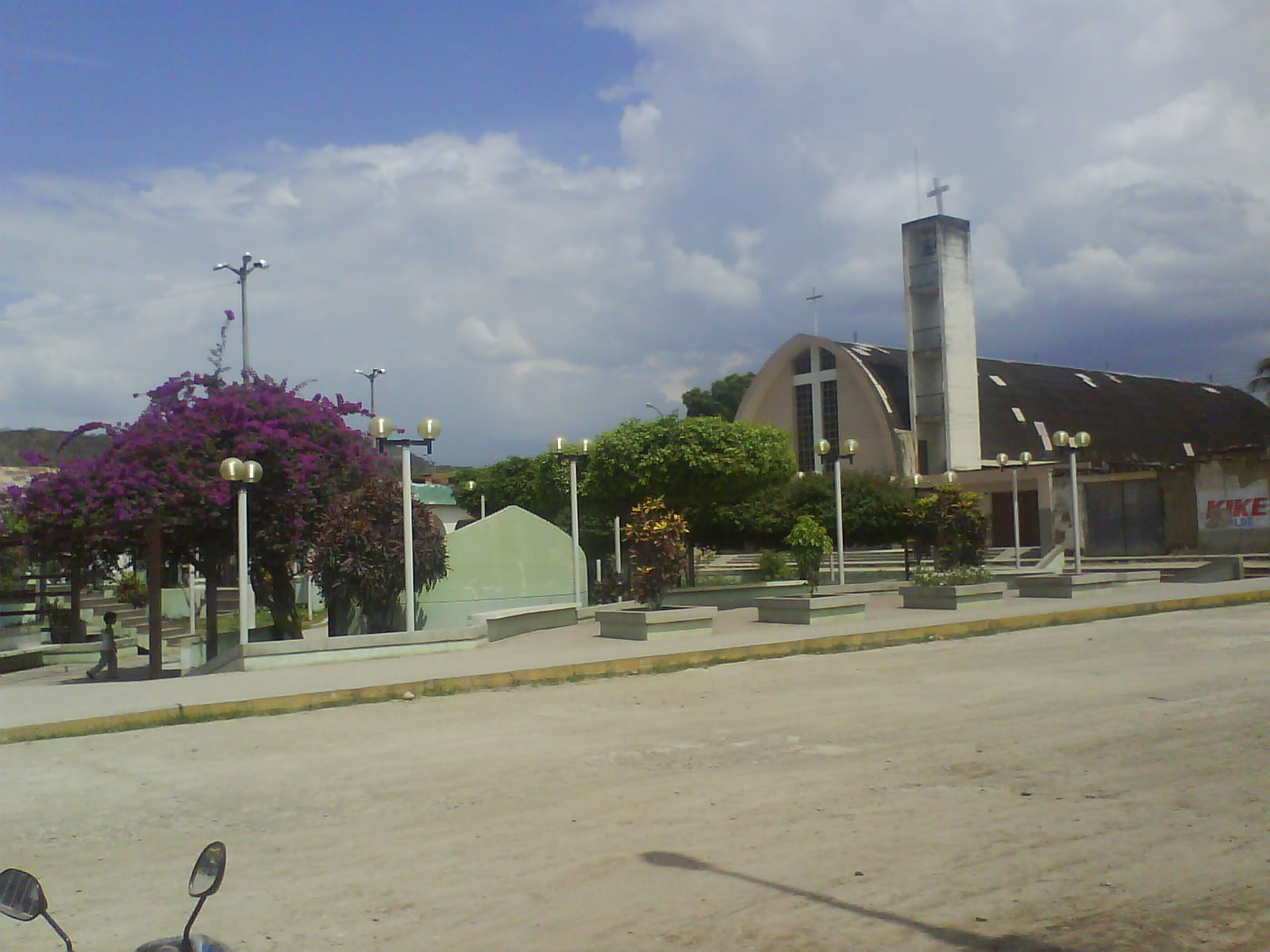 Plaza de armas de la ciudad de Bellavista de Jaén, Cajamarca, Perú